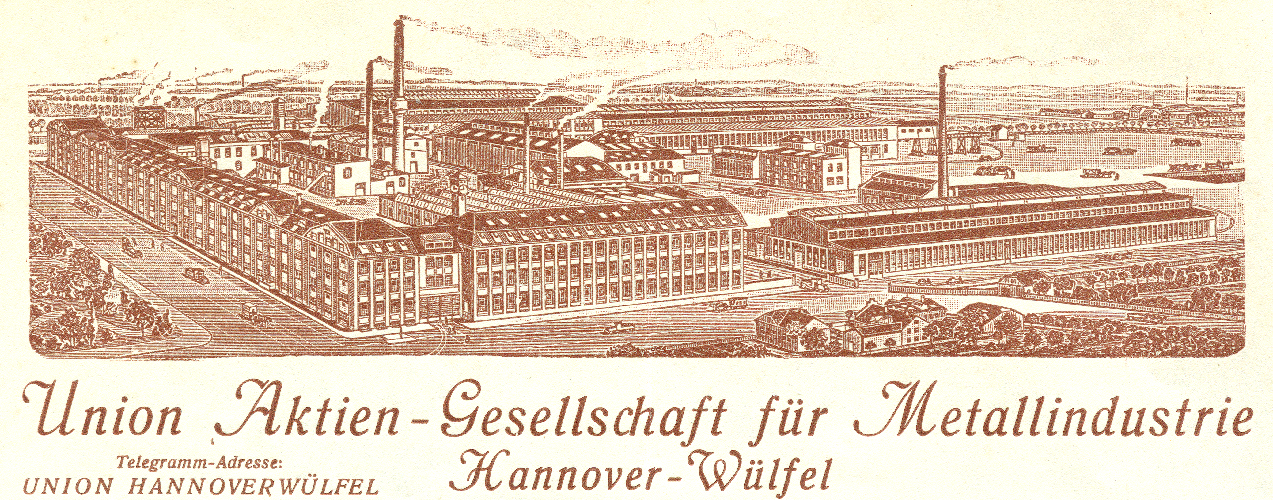 Blick aus der Vogelschau über das Gelände der Union Milchkannen Fabrik Helms in Hannover-Wülfel, 1922 zur Union AG für Metallindustrie umgewandelt. Das mittlere Fabrikgebäude im Vordergrund an der Stiegelmeyerstraße wurde später auch als Motiv für Briefbogen und Rechnungsbogen der Firma Norddeutsche Gummiwaren-Fabrik Hannover genutzt. Die alte Dorfstraße auf der linken Seite führt bis an die Wilkenburger Straße heran ...